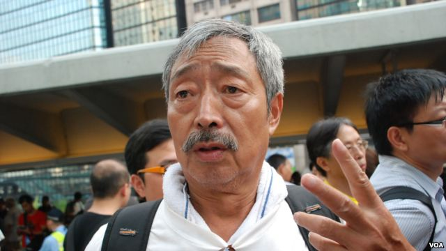 Lo Hom-chau